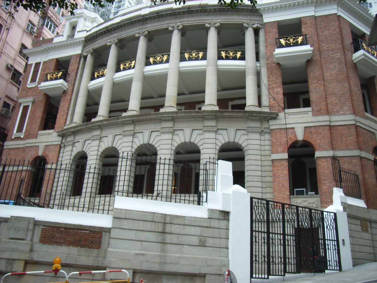 Dr. Sun Yat-sen Museum (Traditional